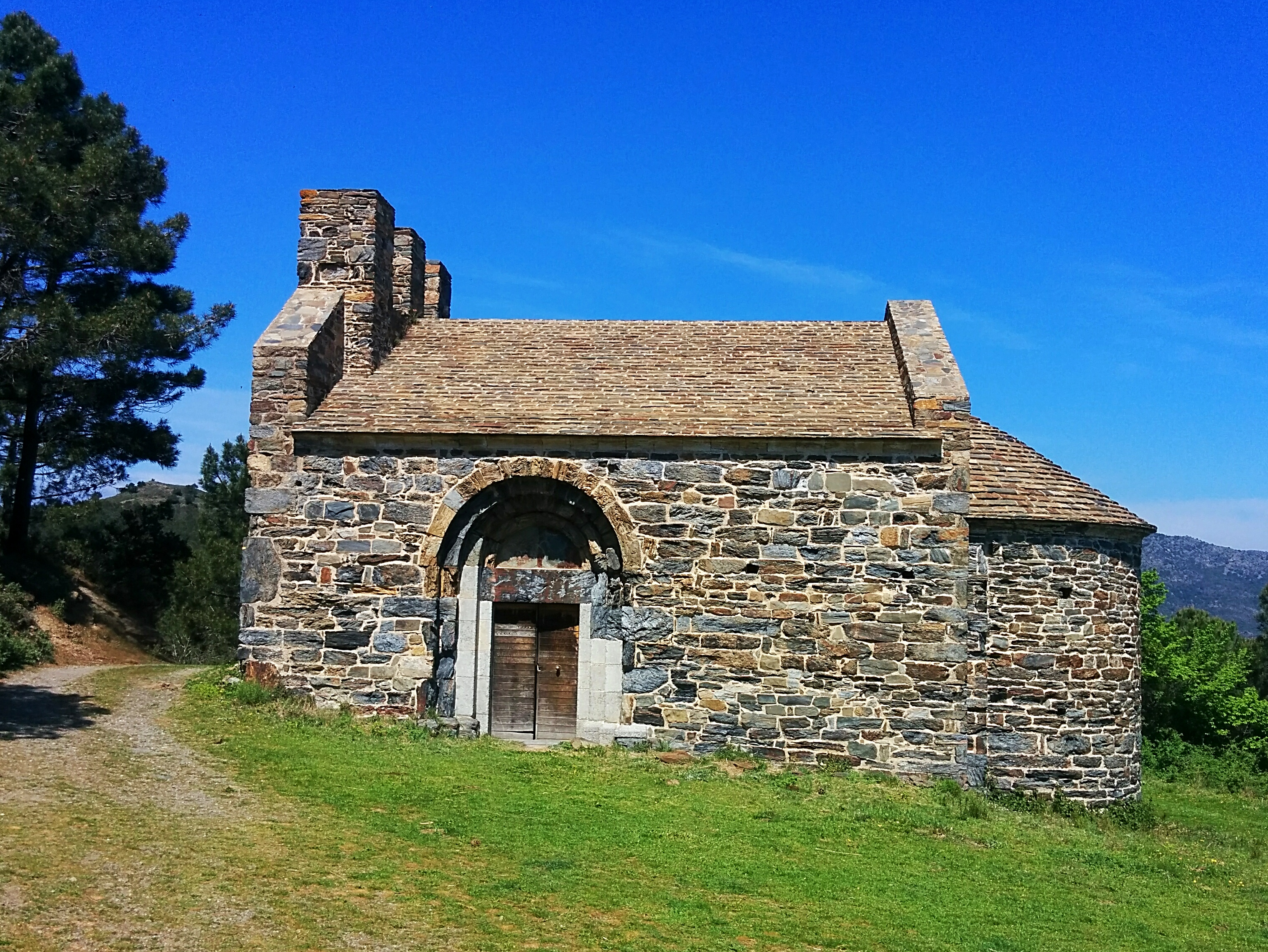 Cap de Creus This is a photography of a Special Area of Conservation in Spain with the ID: ES5120007. Natura2000 entry, EEA entry